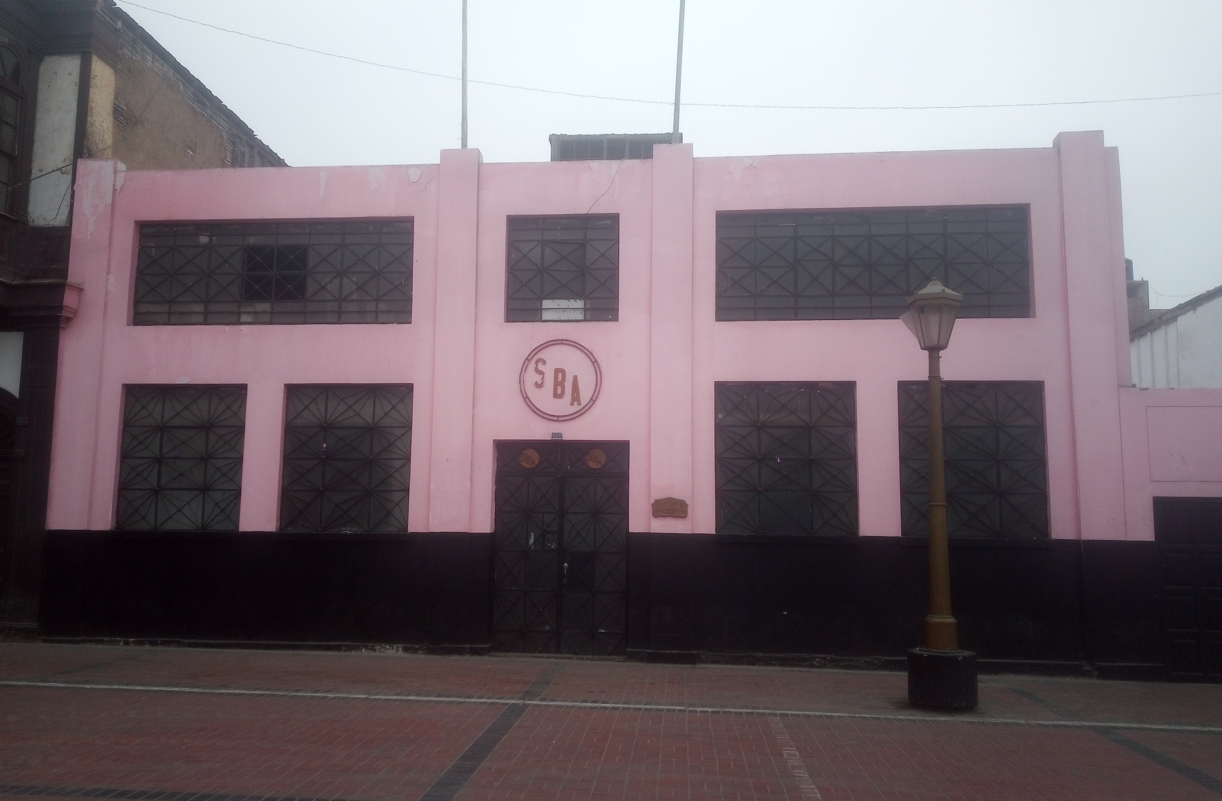 Local del club Sport Boys ubicado en el jirón Pedro Ruiz Gallo 153 (ex Calle Teatro) en el distrito del Callao.